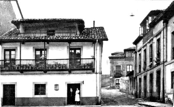 Foto de Casa Lustinda en Noreña. Anterior al año 1937